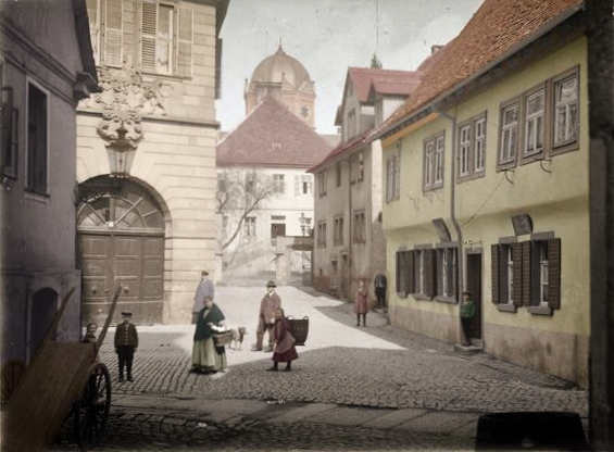 Platz (heute Rathausplatz) mit Eingang zum Schloss (links, heute Rathaus), Synagoge (hinten; 1902-1938), davor kath. Pfarramt (Mitte, heute städt. Kämmerei) und das Feser-Haus (rechts; heute Stadtverwaltung)